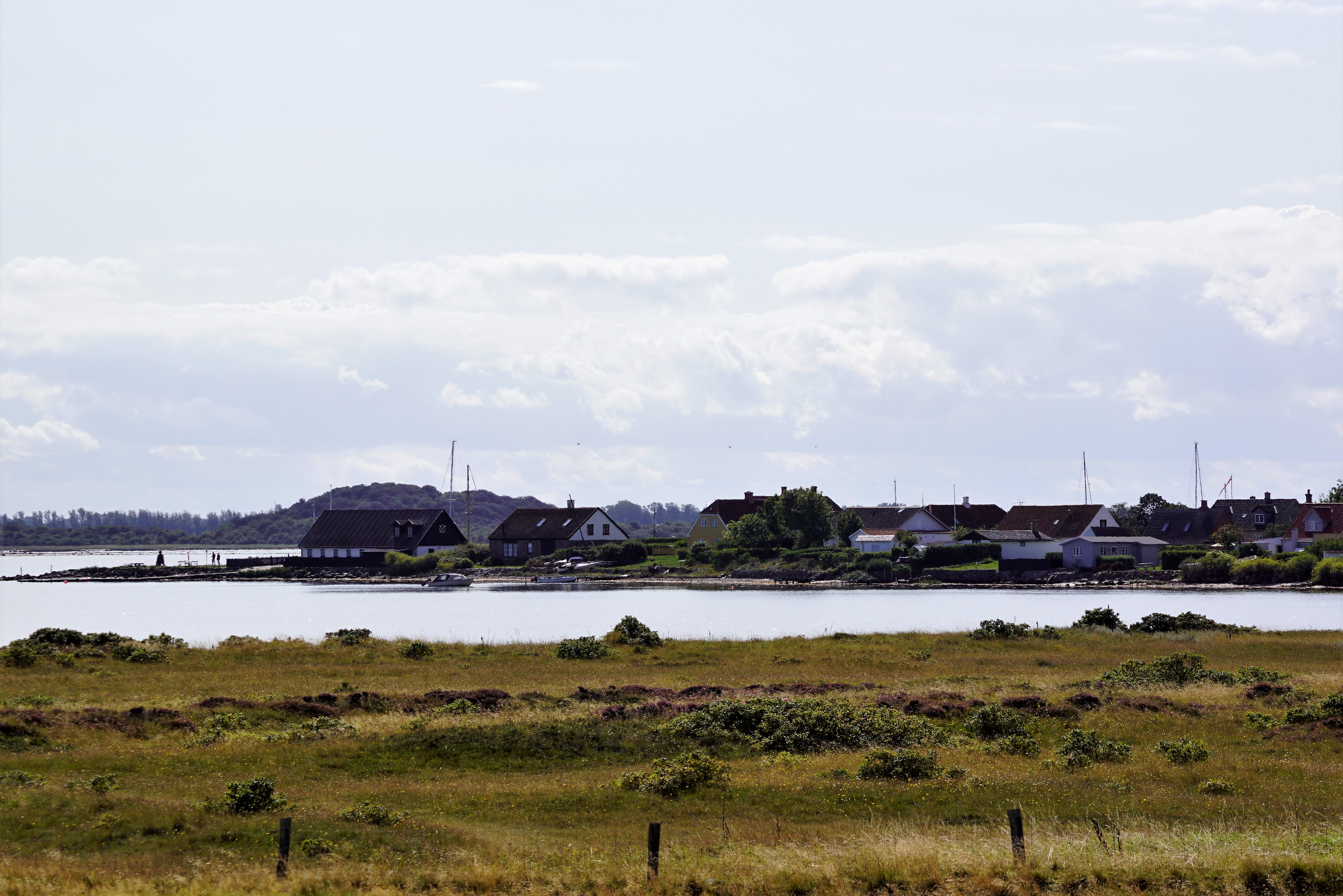 Strandengen på Lilleøre med Langør i baggrunden